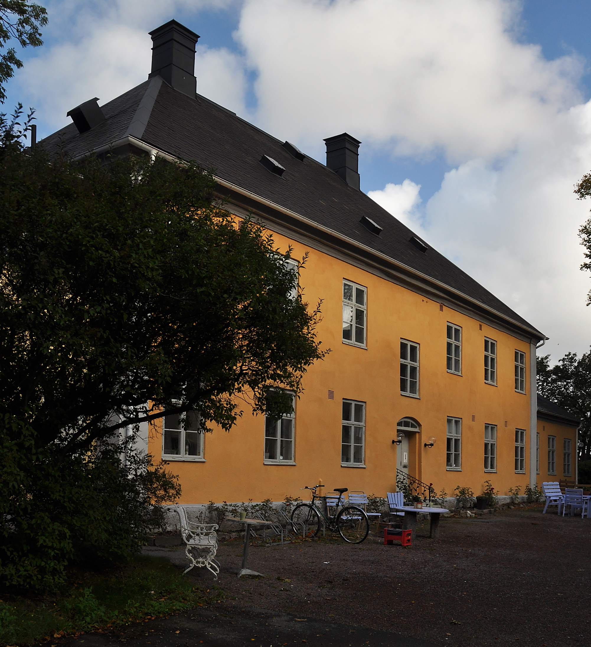 Göteborgs fd spinnhus, Stampen